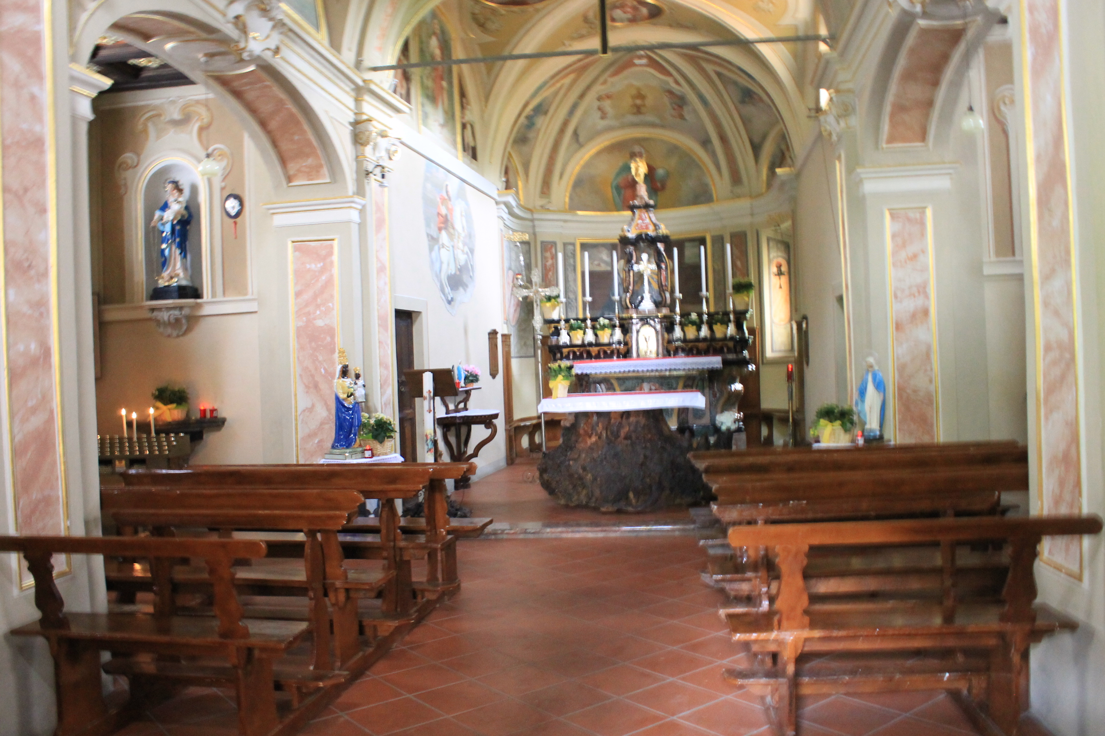 Chiesa